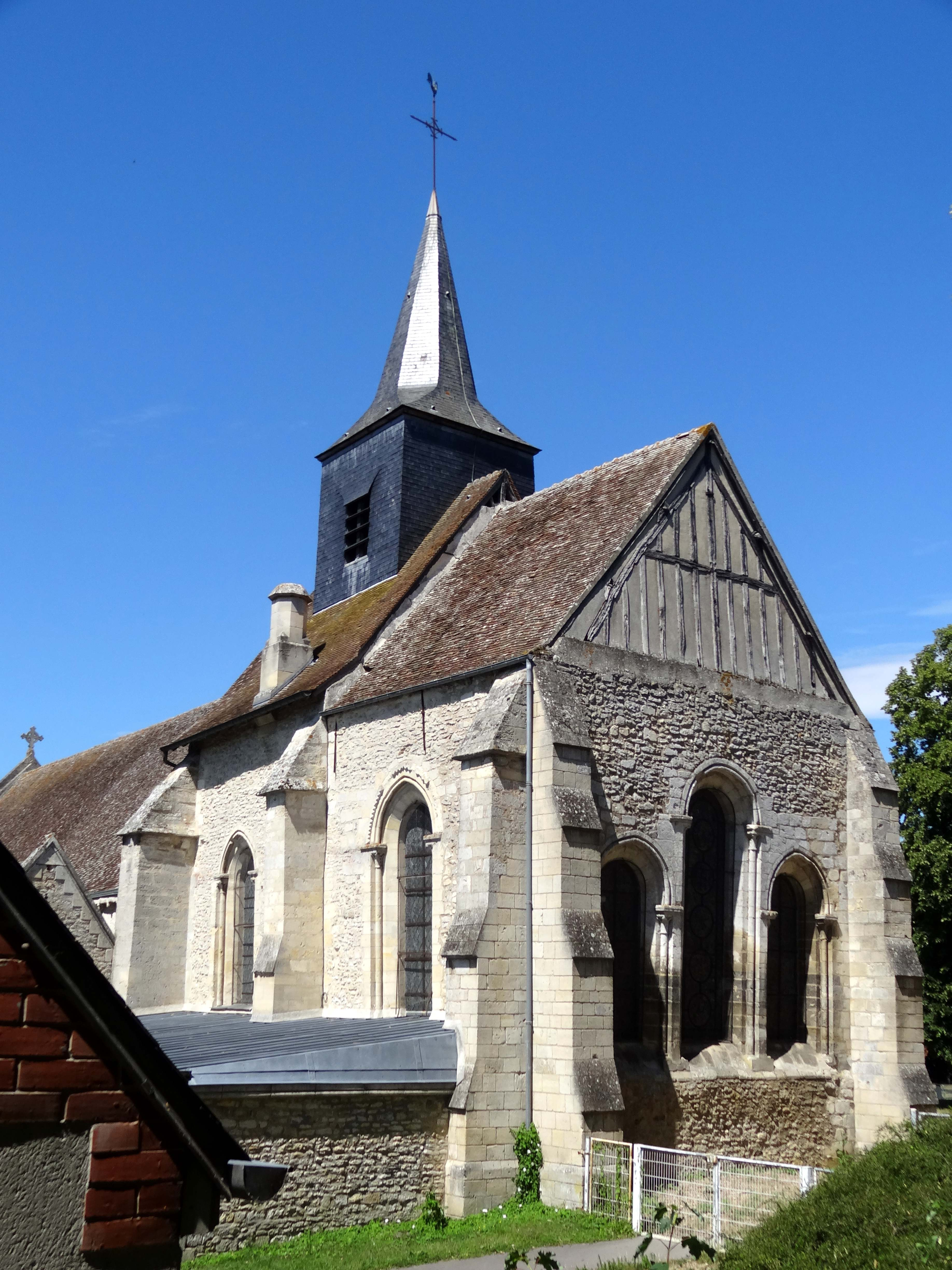 Église Sainte-Madeleine de Trie-Château - voir titre.